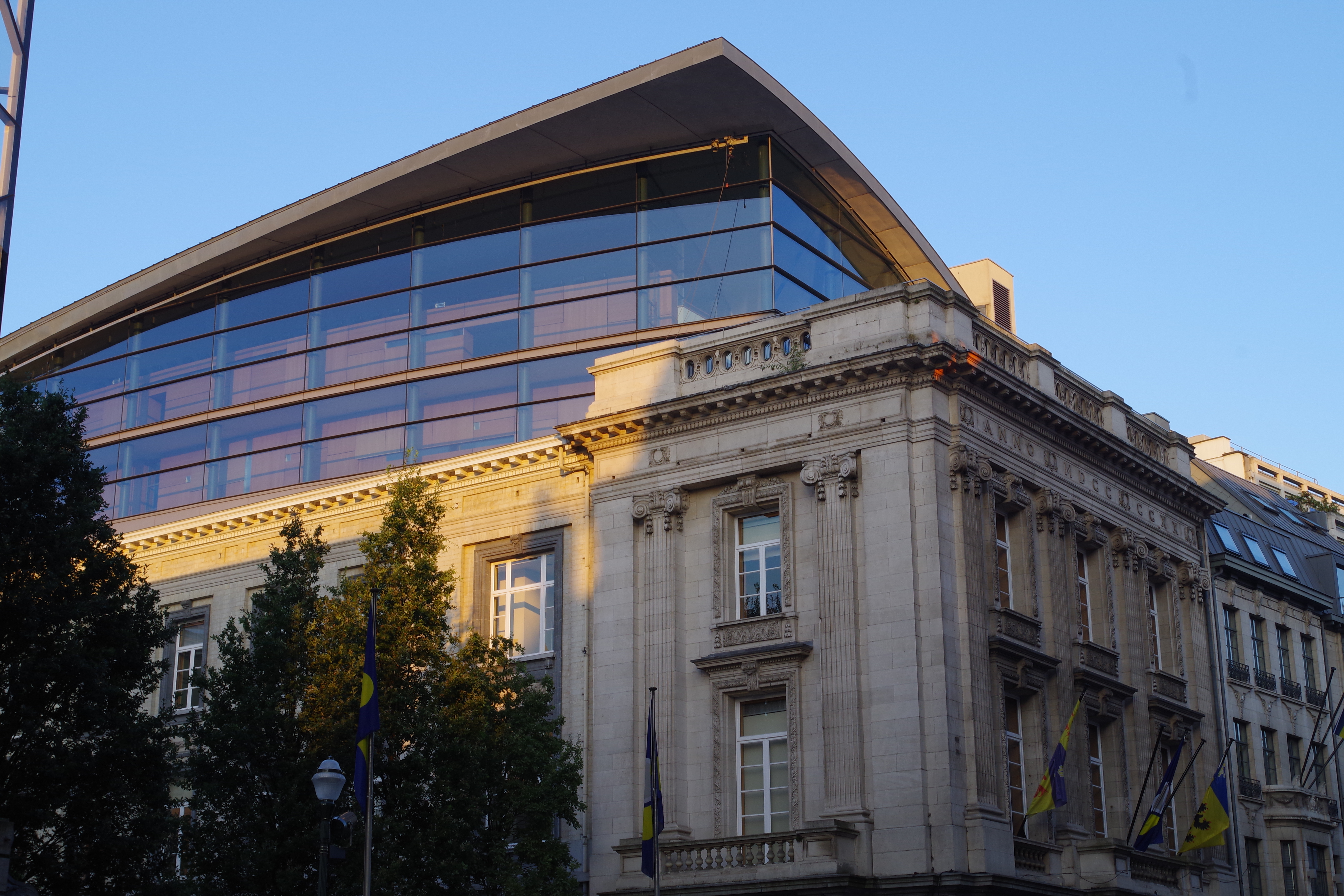 Palais Parlement bruxellois